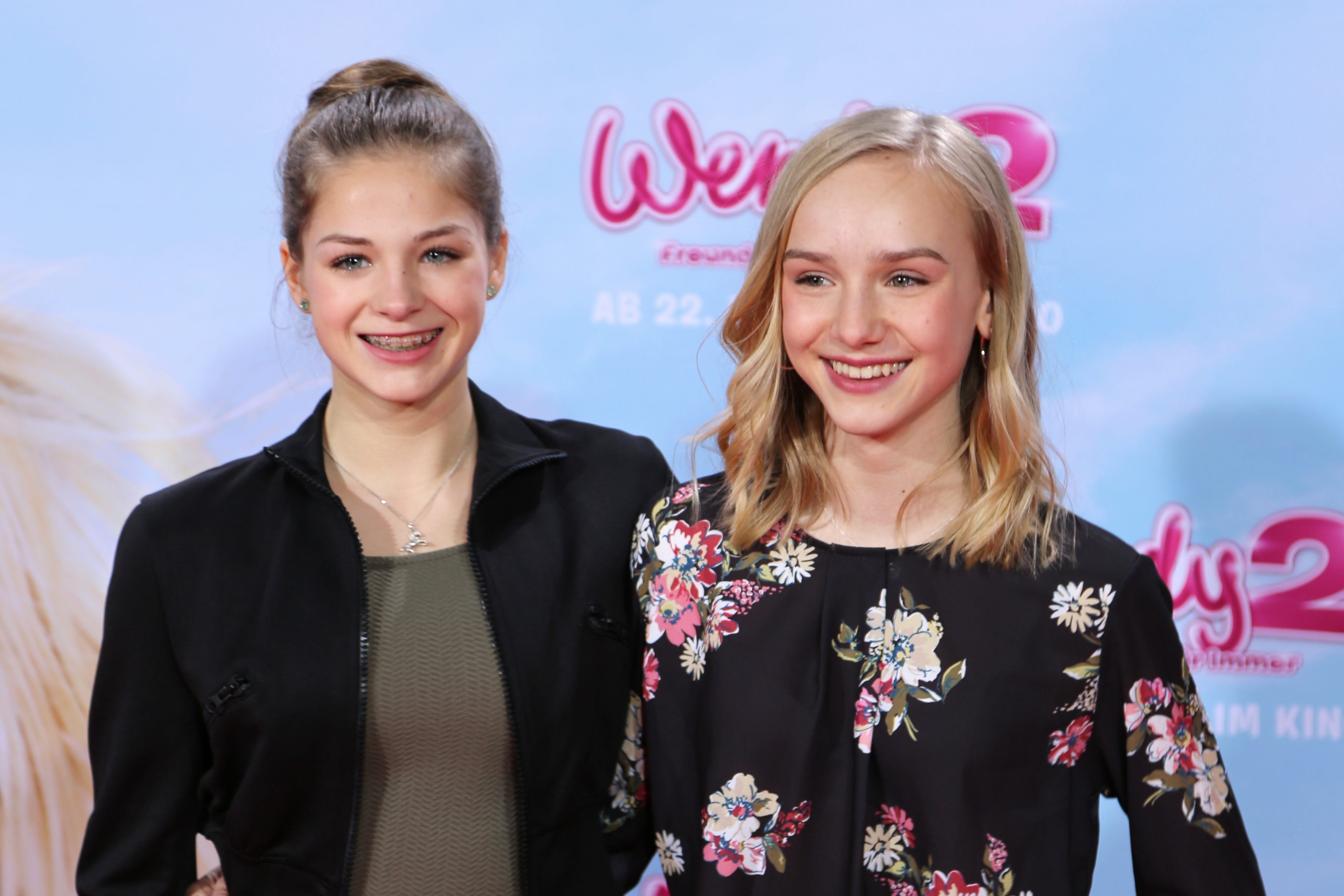 Henriette Morawe & Jule Hermann bei der Premiere von Wendy 2, im Februar 2018.